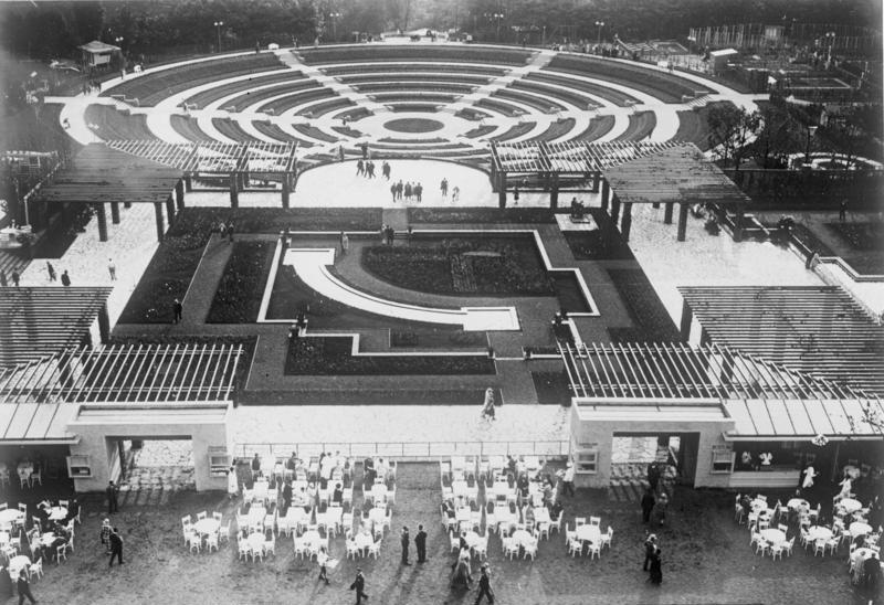 Die Eröffnung der "Gruga", der grossen Gartenbau-Ausstellung in Essen! Blick in den Rosengarten und Dahlien-Arena aus der Vogelperspektive.